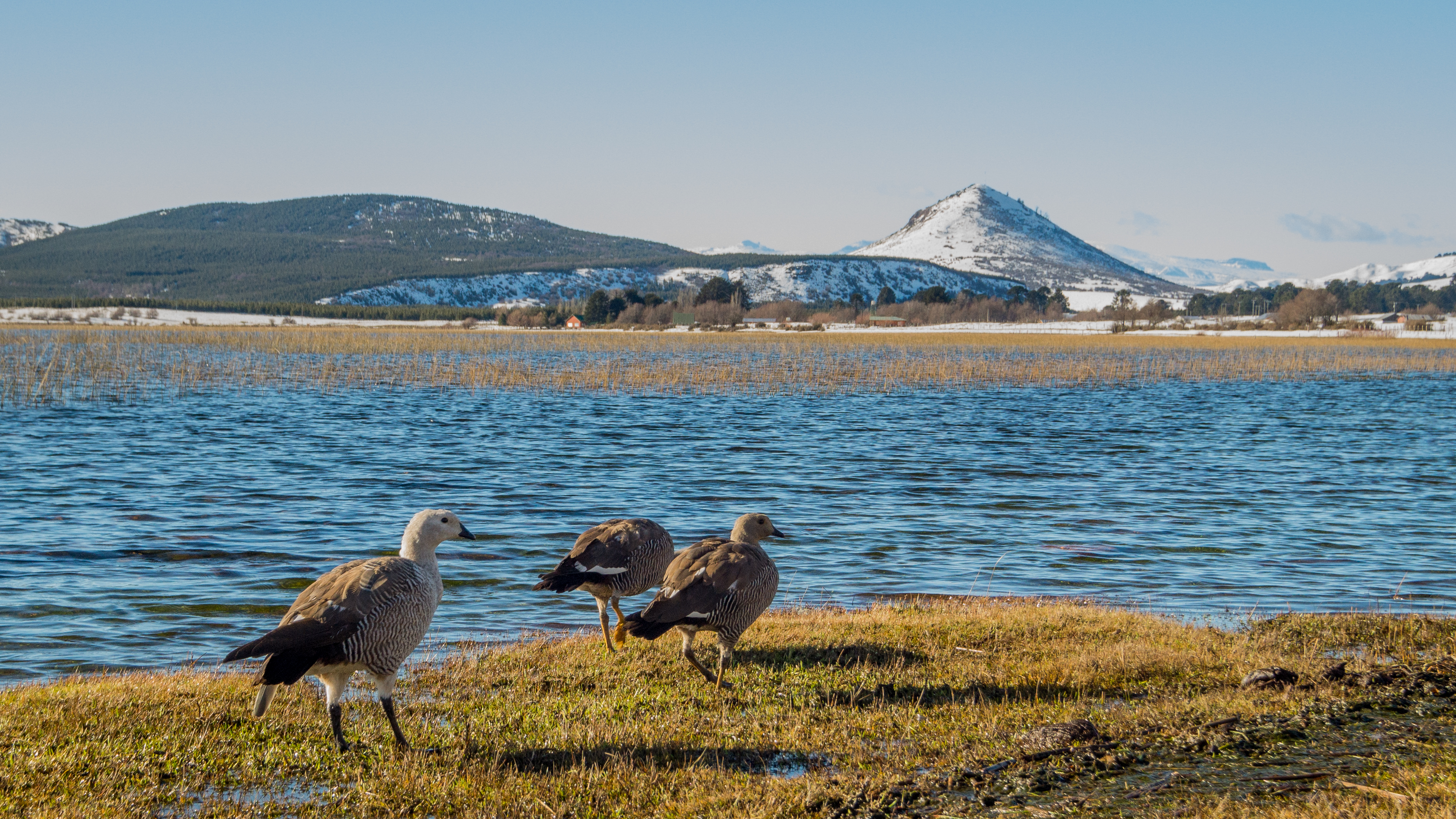 Reserva nacional Lago Galletué